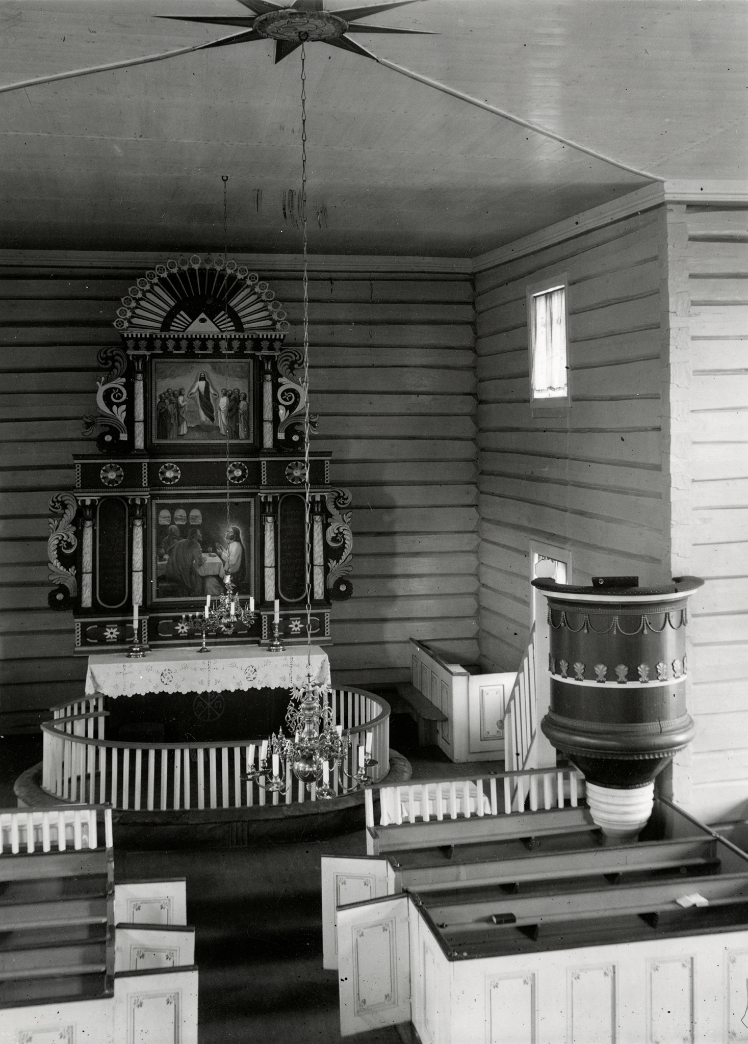 Interør i Bygland kirke. Foto: Finn Krafft, fra Kulturminnebilder.no.